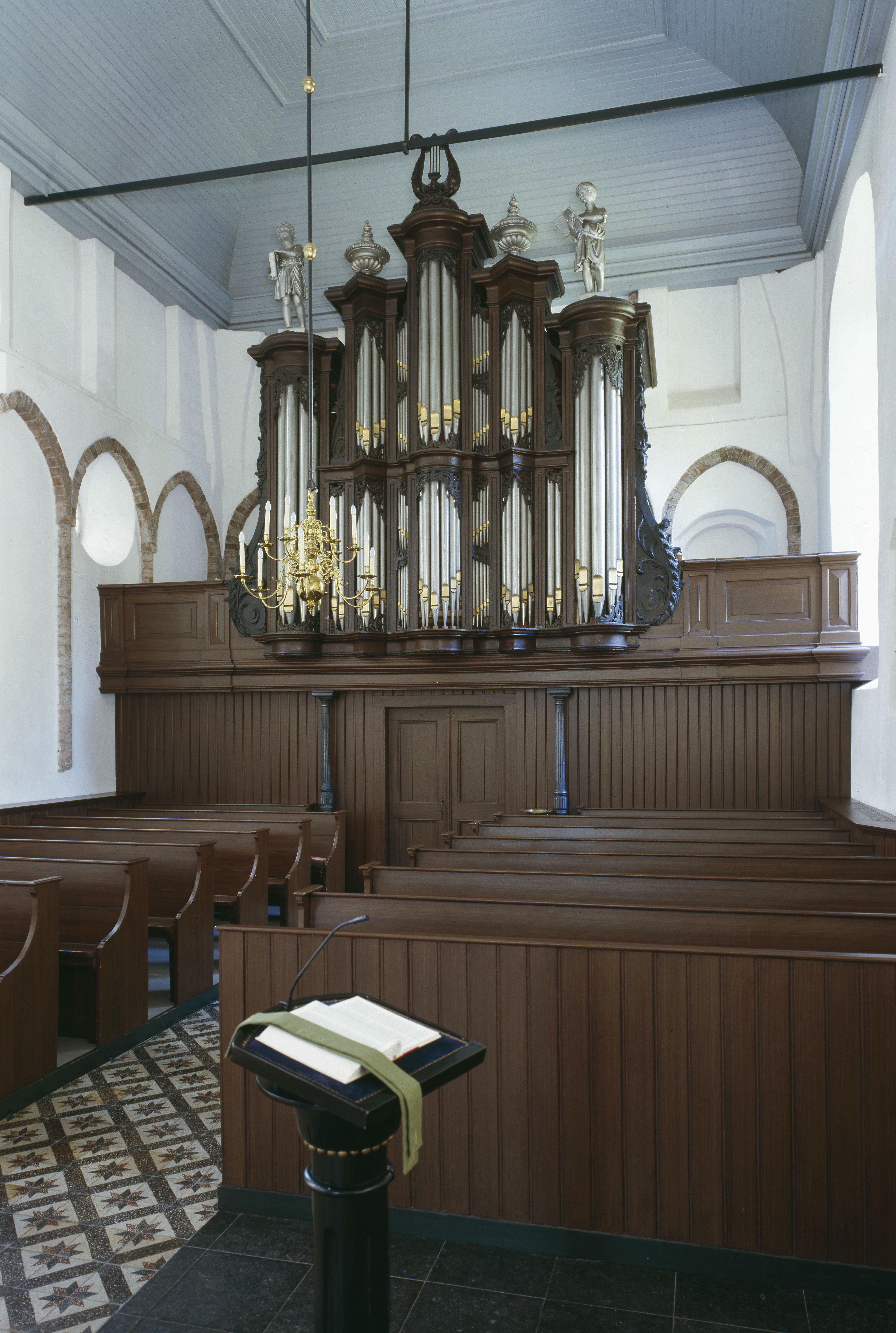 Nederlands Hervormde Kerk: Interieur, aanzicht orgel, orgelnummer 1368 (opmerking: Gefotografeerd voor Het Historische Orgel in Nederland 1894-1901, bladzijde 73)